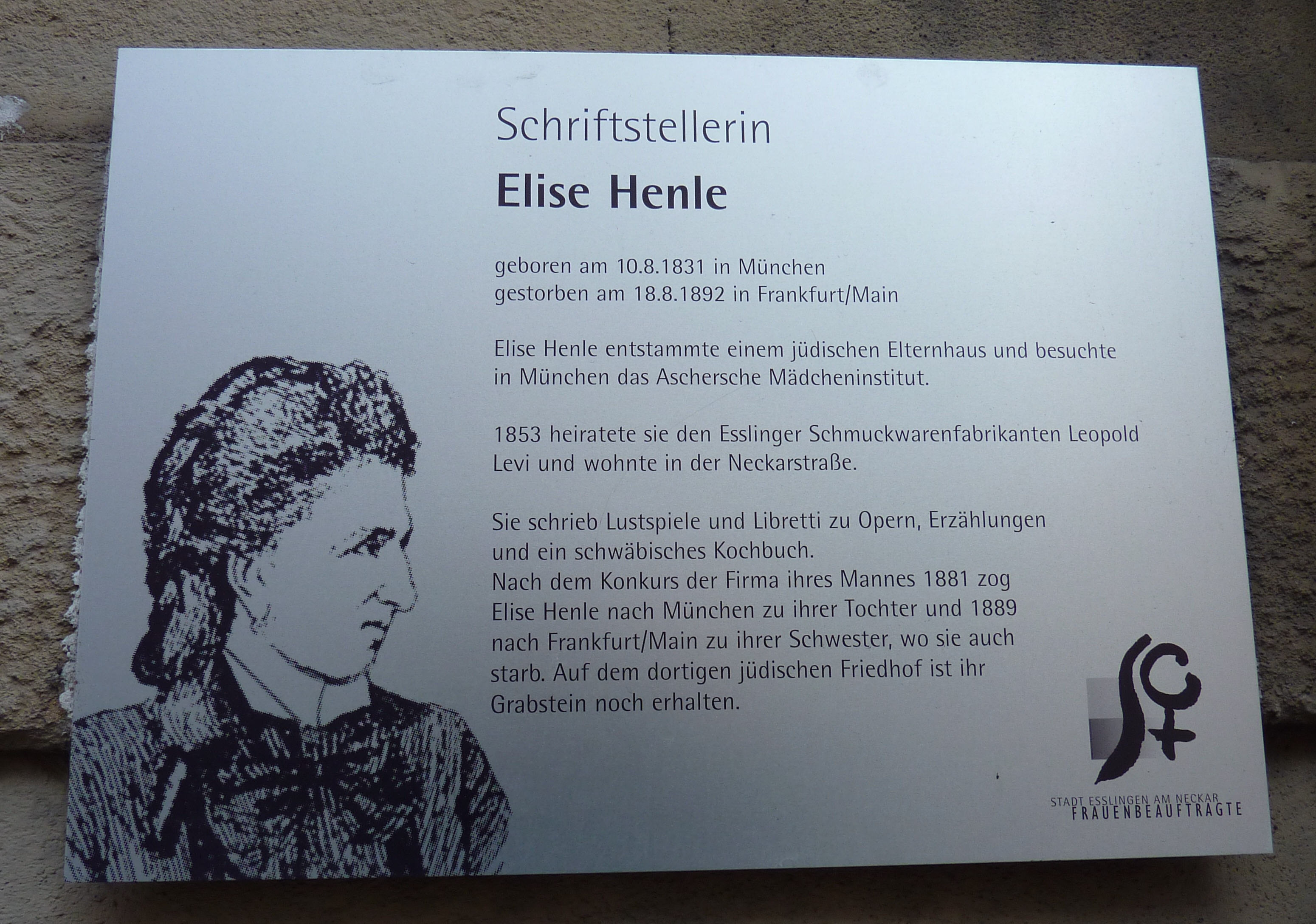 Infotafel zu Elise Henle an ihrem einstigen Wohnhaus